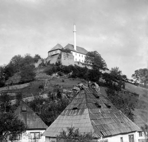 Bosna, Cazin - mešita